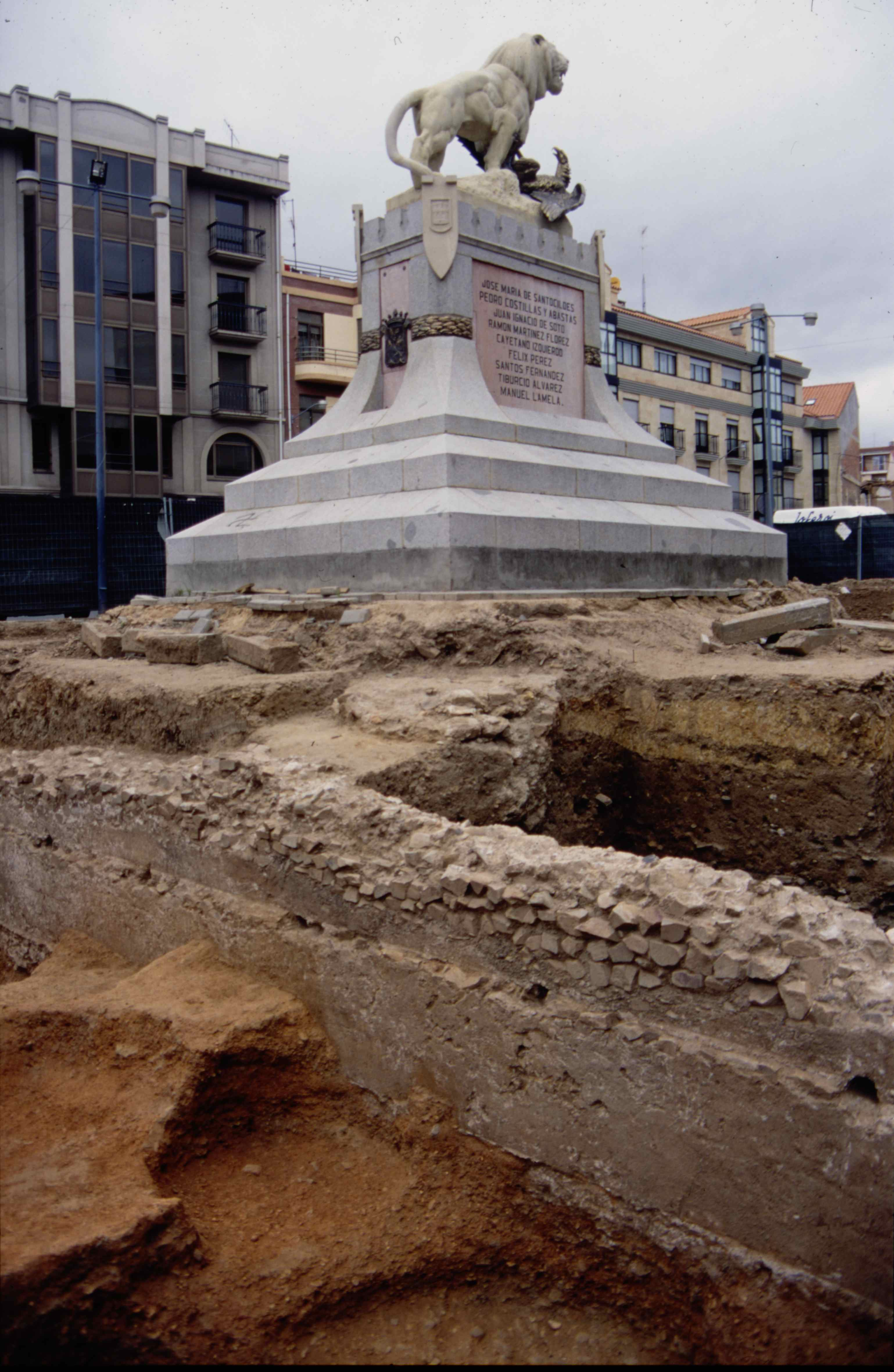 Muro de cierre del foro flanco norte. Excavación realizada en Astorga (provincia de León, España). Foto por M.A. Sevillano. Museo Romano de Astorga.